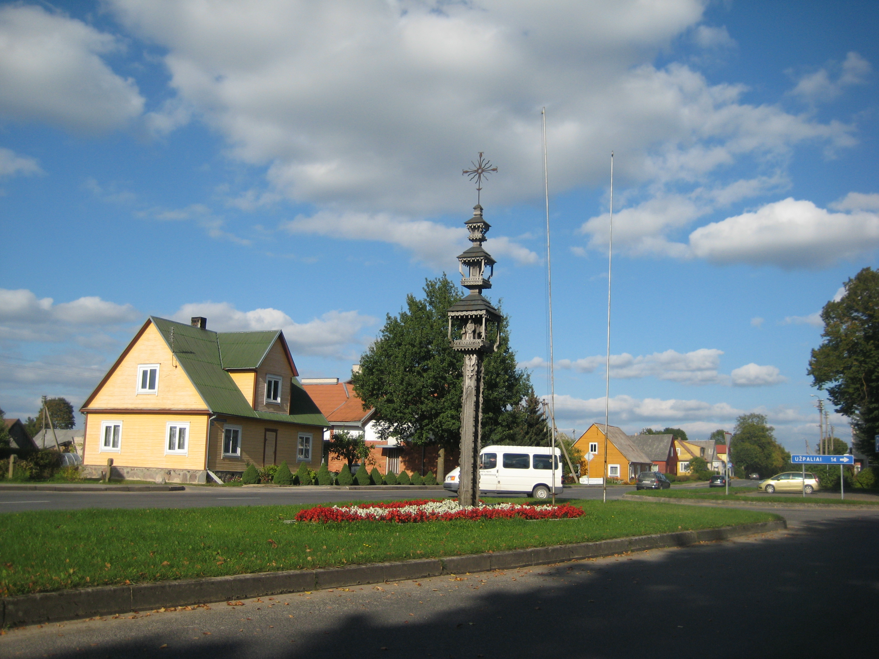 Svėdasai, Lithuania